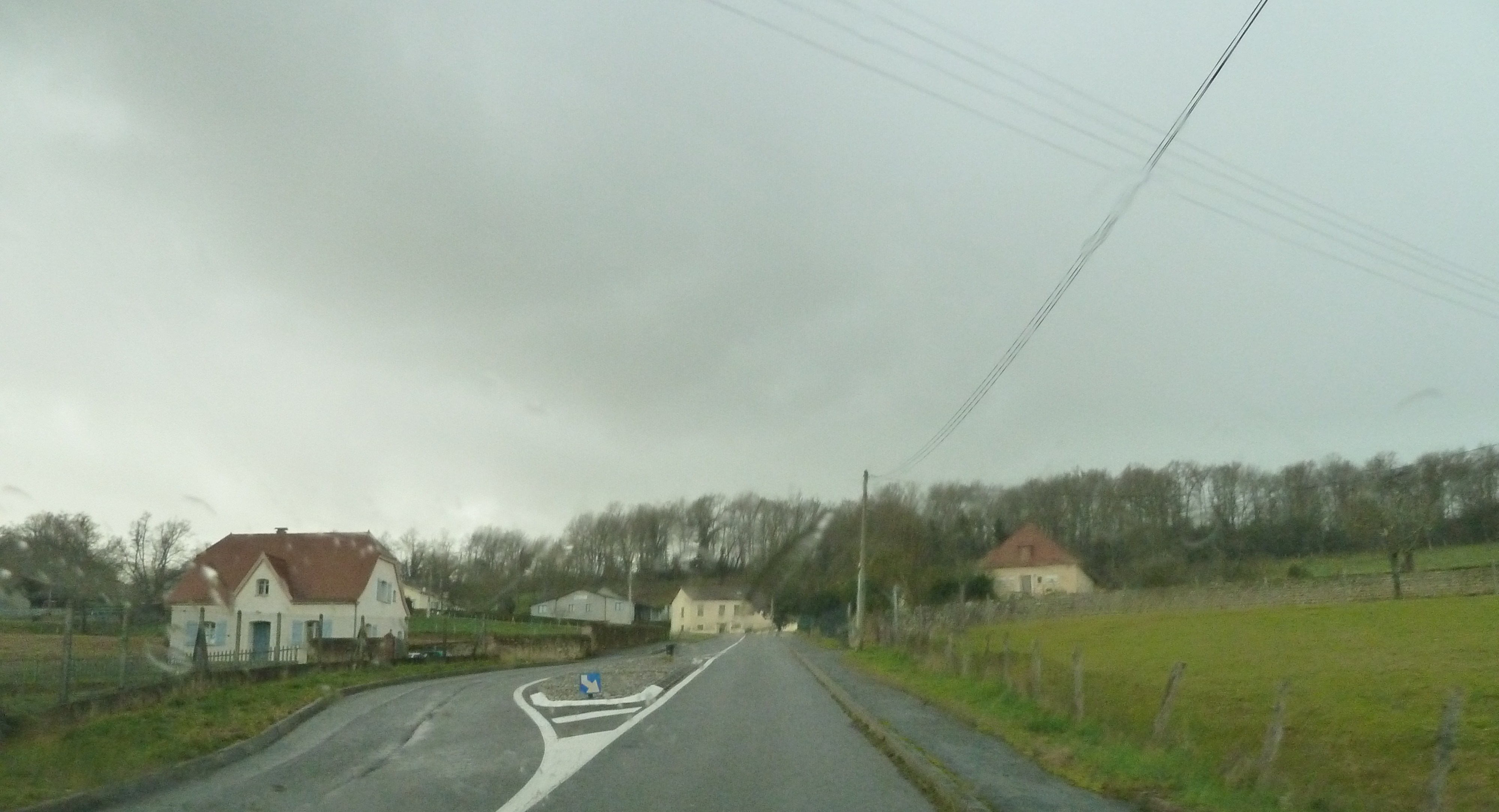 Baleix